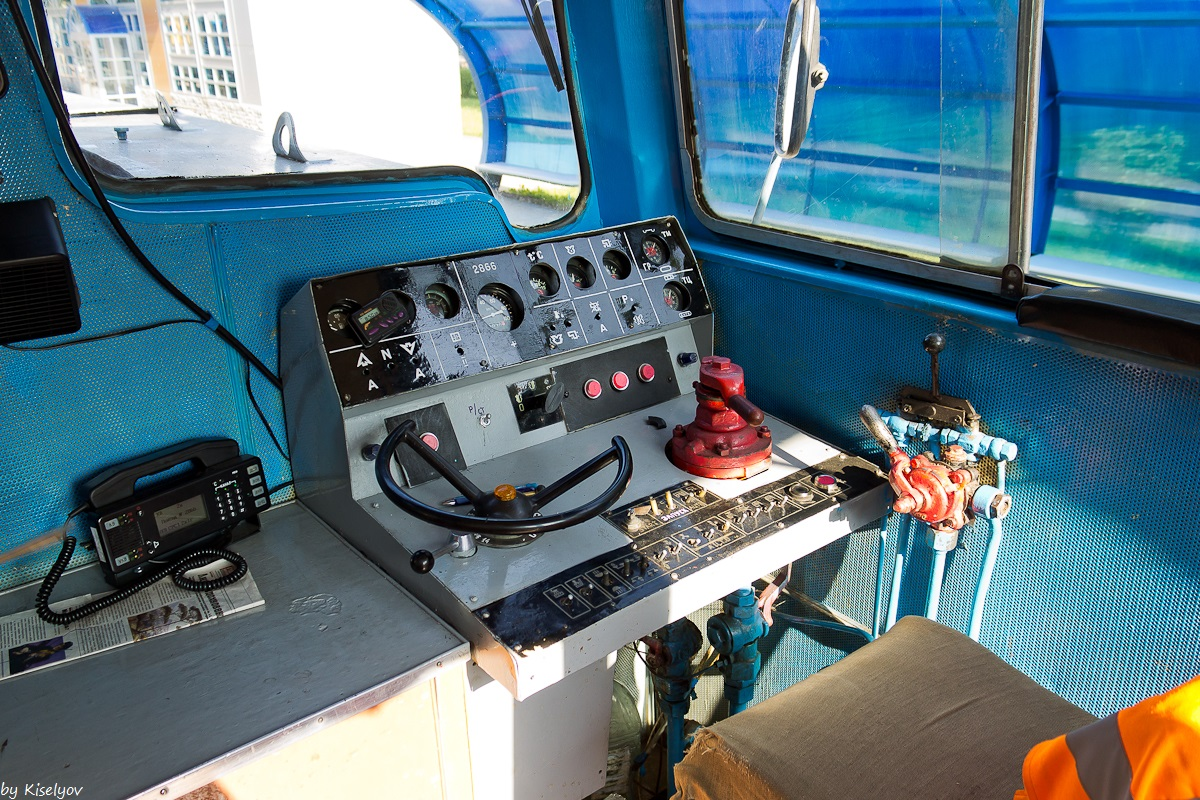 Кабина тепловоза ТУ7А-2866.